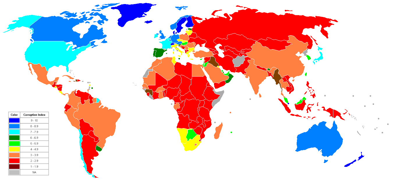 מקור - מפת תדמית השחיתות השלטונית בעולם לשנת 2006.